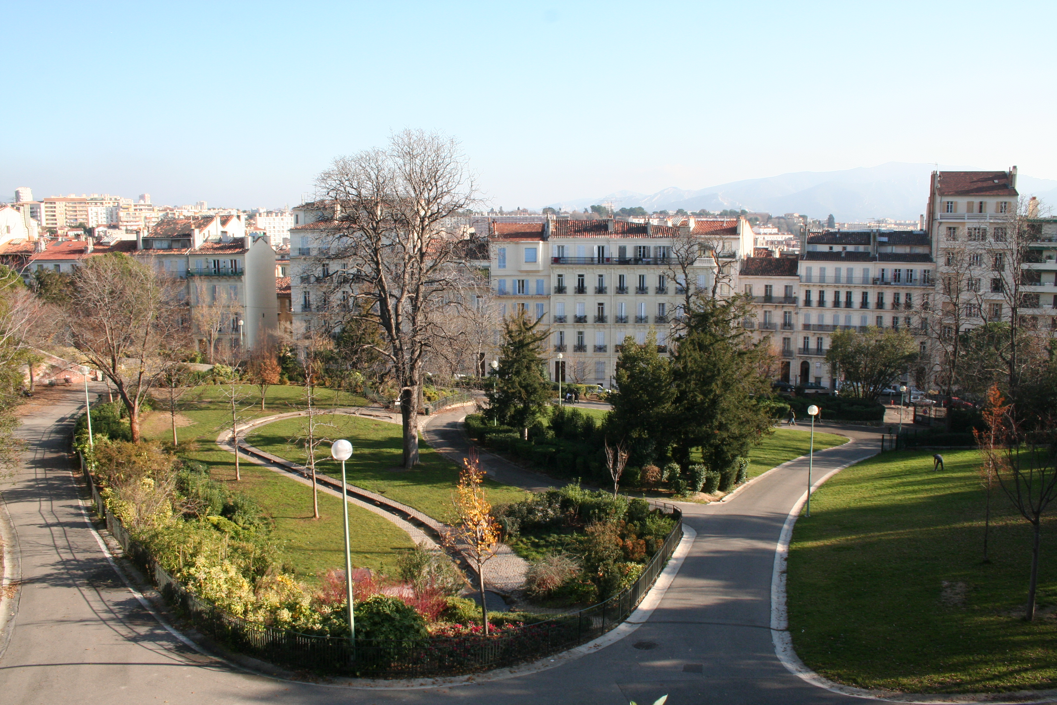 Palais Longchamp, Marseille (France).